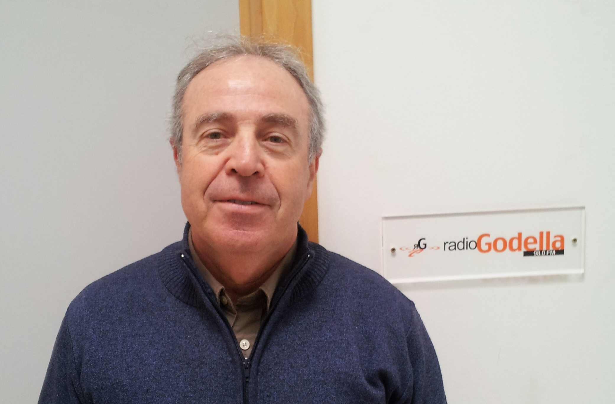 Antonio Laguna a La Represa